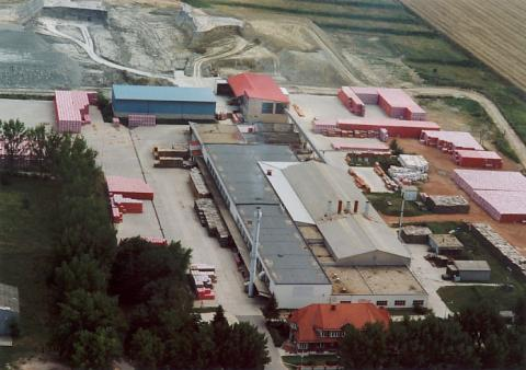 A factory in Balatonszentgyörgy?